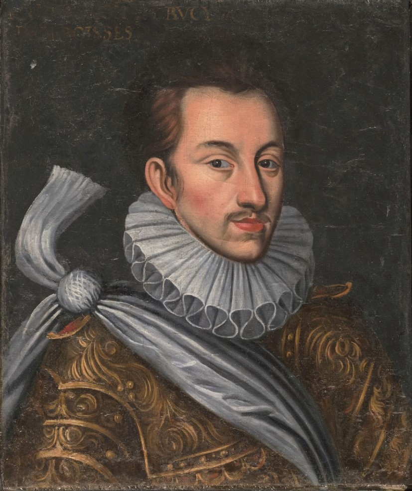 Portrait anonyme de Louis de Bussy d'Amboise, XVIIe siècle, antichambre des hommes de guerre, château de Bussy-Rabutin.